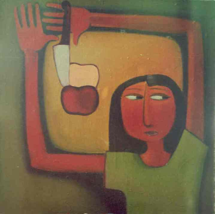 Константин Козловский. «На кухне», холст, масло, 76,5х69,5 см